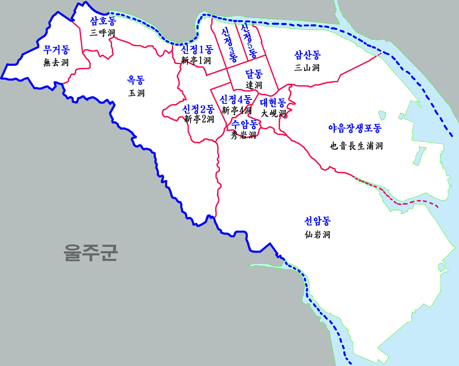 울산시 남구 행정구역도